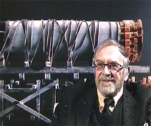 Portrait de Horia Damian